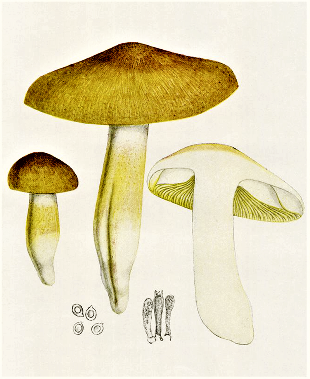 Bres.: Tricholoma corypheum (Fr., 1838) Gillet (1874), heute Tricholoma sejunctum (Sowerby, 1799) Quél. (1872)